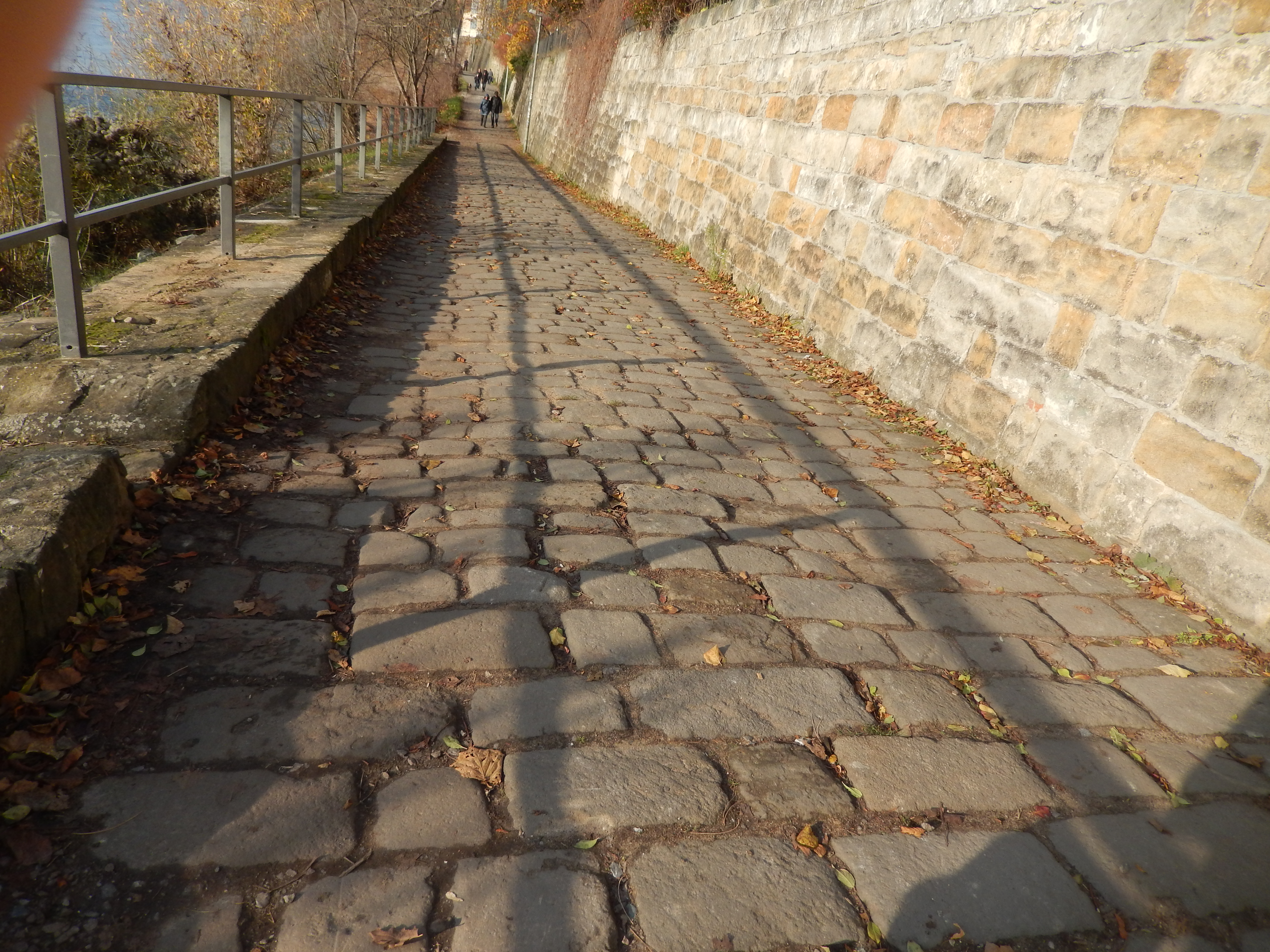 Dresden Körnerweg: Der Körnerweg entstand bereits vor dem Jahr 1700 und verband als Marktweg das Dorf Loschwitz mit der Stadt Altendresden (Dresdner Neustadt). Die Händler und Bauern brachten so ihre Erzeugnisse in die Stadt. Im Zeitalter der Industrialisierung benutzten die Bomätscher (Schiffszieher) den Weg zum Ziehen der Elbkähne. Der Weg wurde um 1908 verbreitert und endete an der Holzhofgasse. Heute wird er von Wanderern und Spaziergängern genutzt und ist Bestandteil des Elberadweges. Sanierung ist geplant. Blick in Richtung Stadt